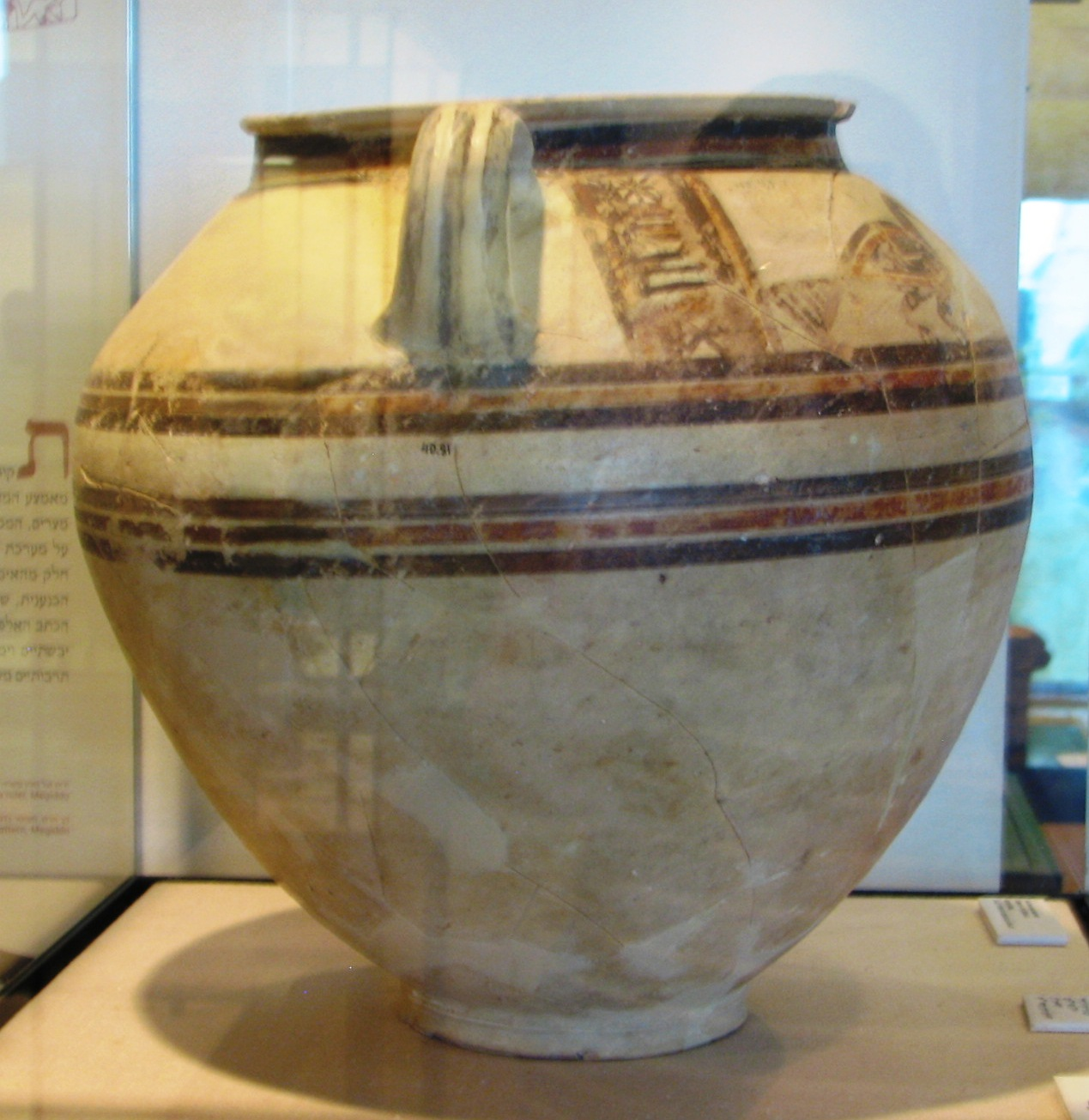 Late Bronze Period Pottery in Hecht Museum כלים מתקופת הברונזה המאוחרת במוזיאון הכט באוניברסיטת חיפה חלק מהתצוגה של מוזיאון הכט שנמצא באוניברסיטת חיפה קדרה ממשפחת הכלים הדו-גוניים מתל אל עג'ול המאה השש עשרה לפני הספירה